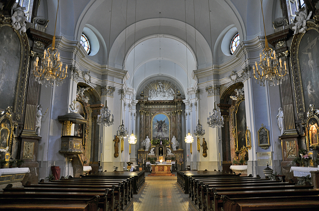 Gumpendorfer Pfarrirche, Wien (Inneres)